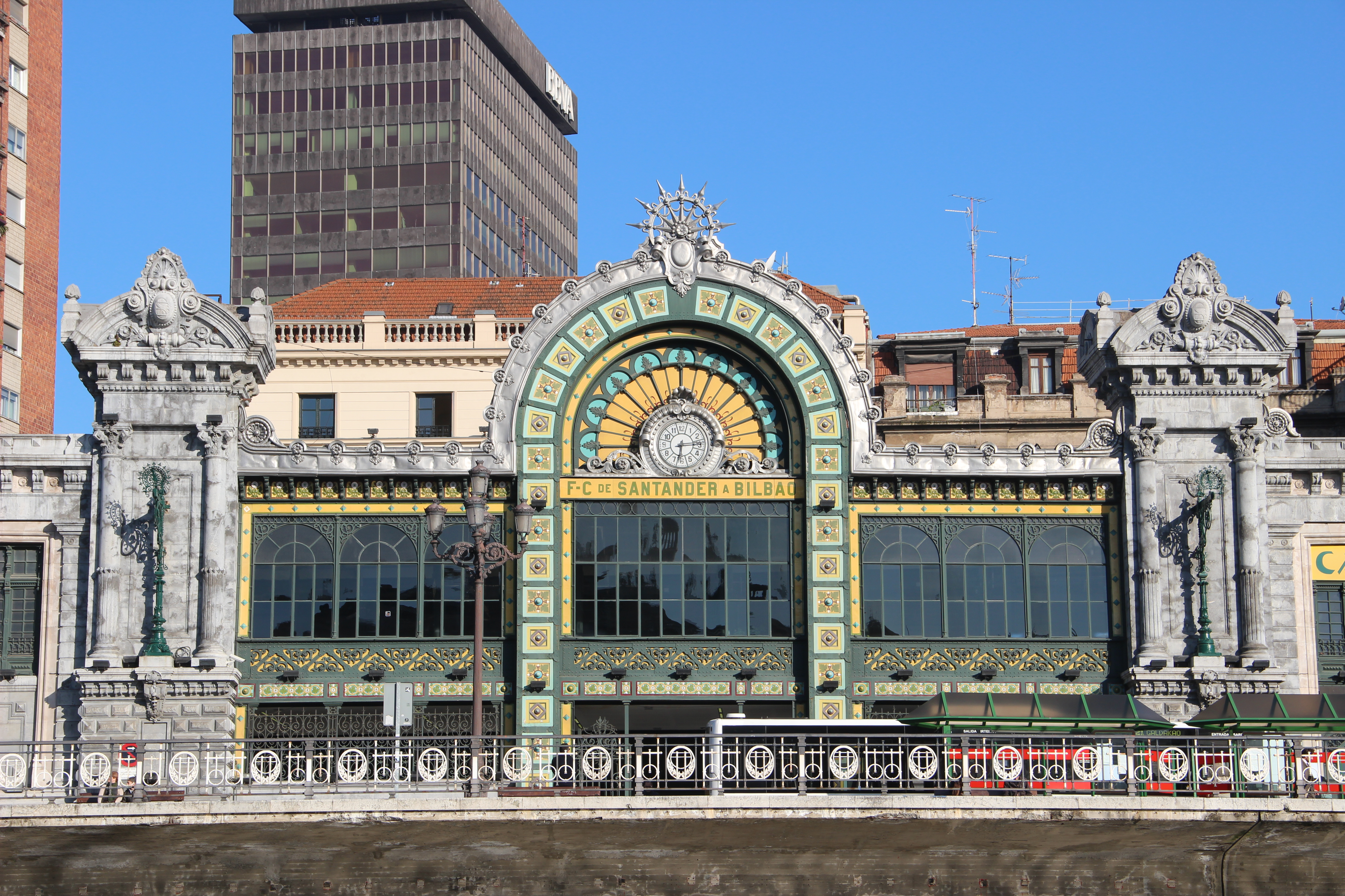 Estación de Abando Indalecio Prieto